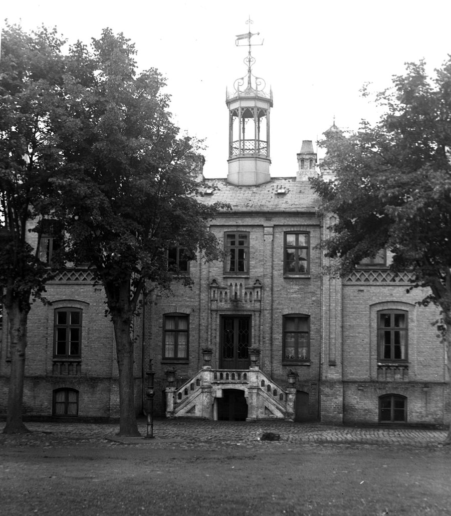 Villa Aldersro, Trøjborgvej 58-66, Århus, bygget 1864, nedrevet i 1956